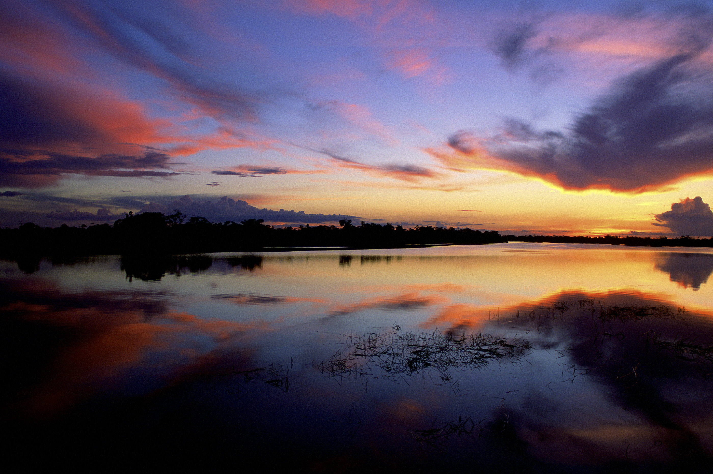 O parque nacional Jau faz parte do complexo de conservaçao da amazonia central